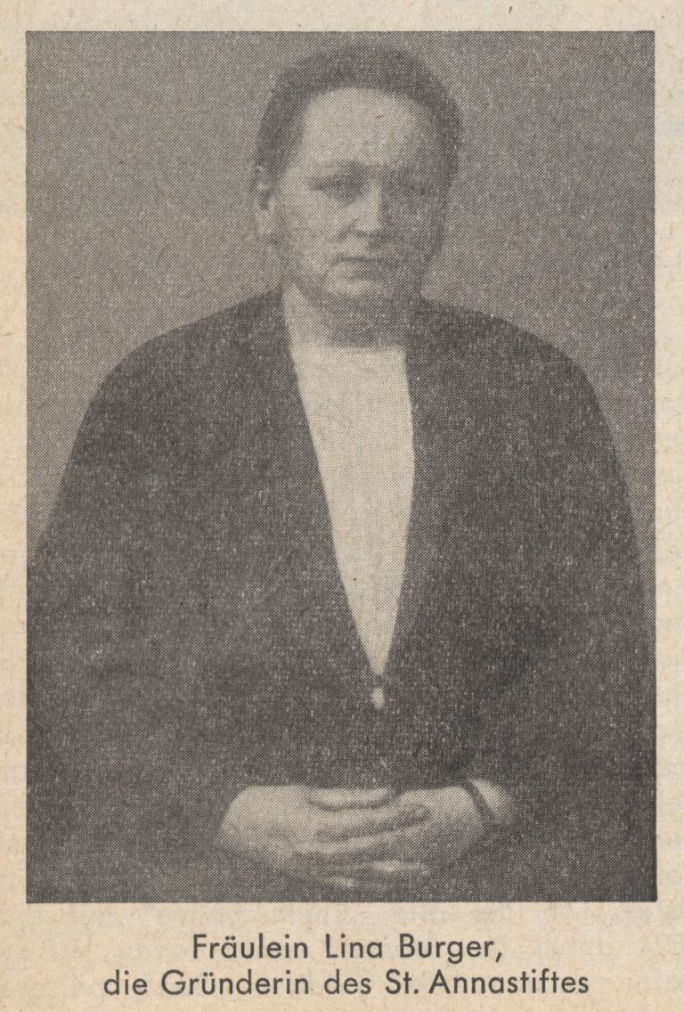 Karolina Burger, Ludwigshafen am Rhein, Lehrerin, katholische Aktivistin, Gründerin des Krankenhauses St. Anna-Stift